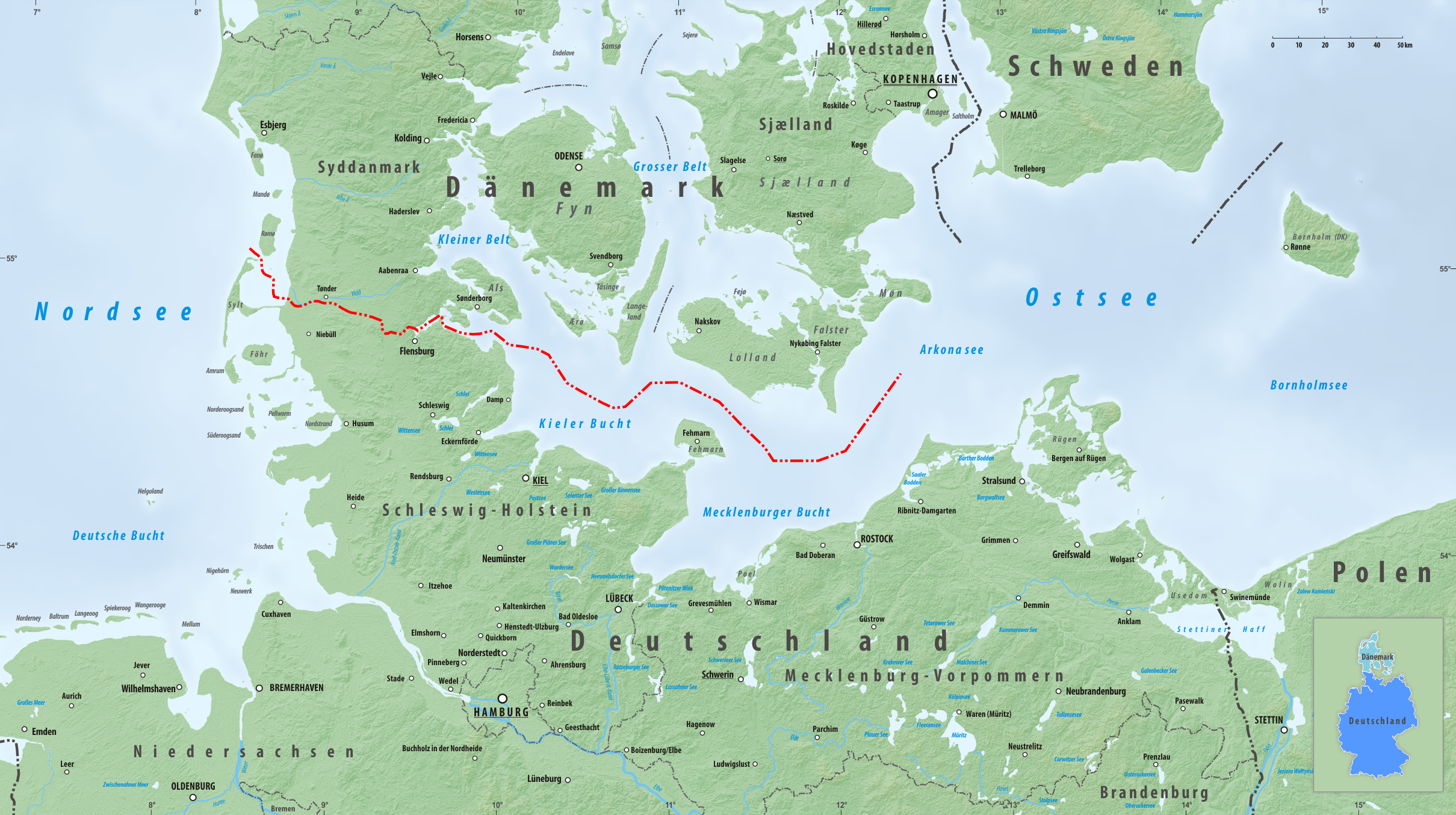 Reliefkarte des Grenzverlaufes zwischen Deutschland und Dänemark Topographischer Hintergrund: NASA Shuttle Radar Topography Mission (public domain). SRTM3 v.2.